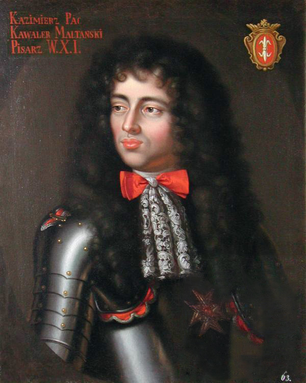 Беларуская (тарашкевіца): Партрэт Казімера Міхала Паца (Kazimier Michał Pac)